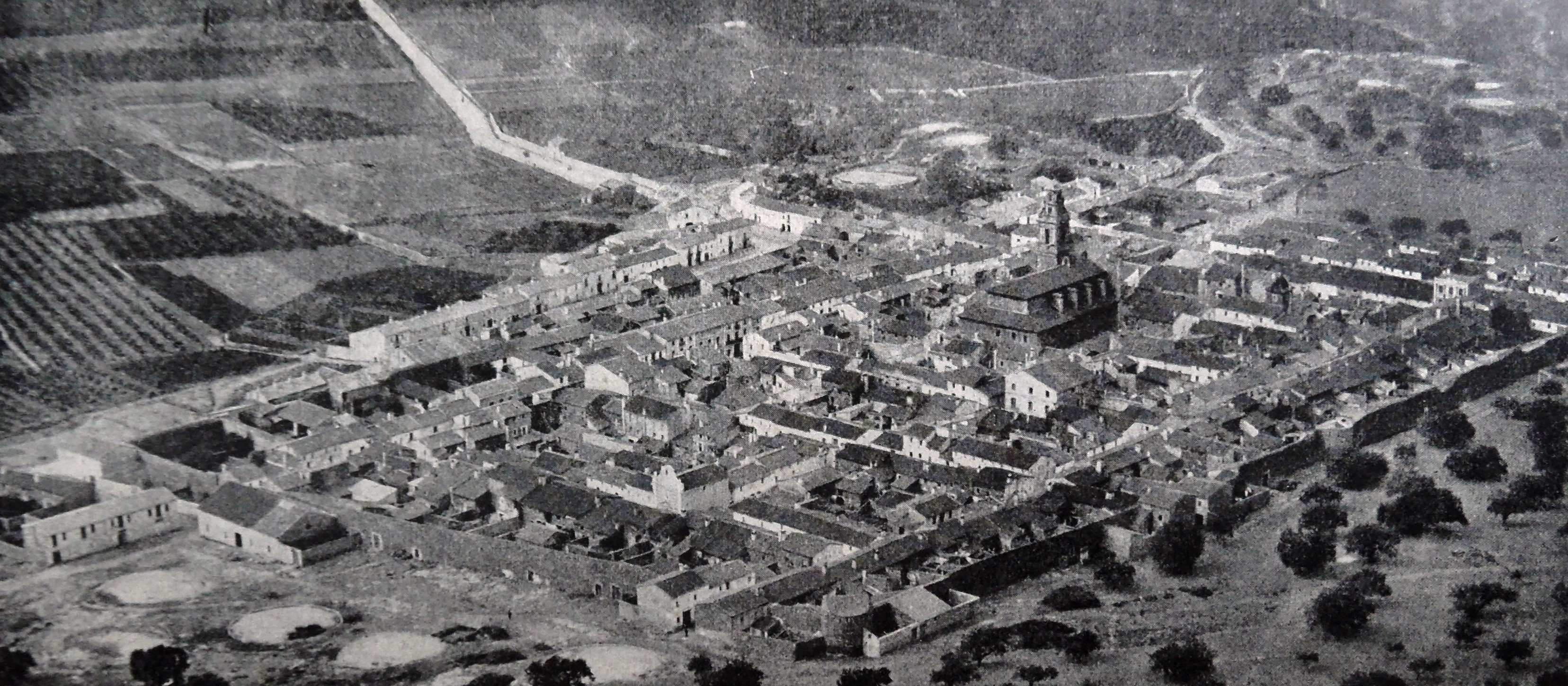 Vista de Almenara desde el cerro del Castillo.